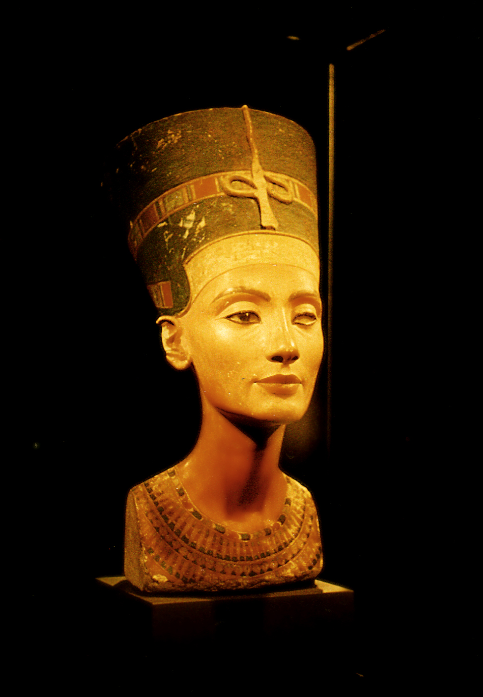 Бюст царицы Нефертити. Фото оригинала из Египетского музея. Берлин.